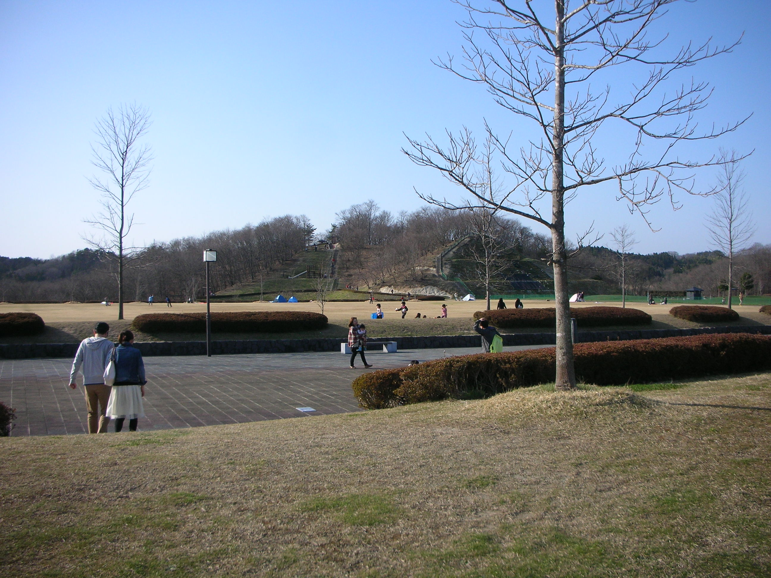 万葉の森クリエートパーク